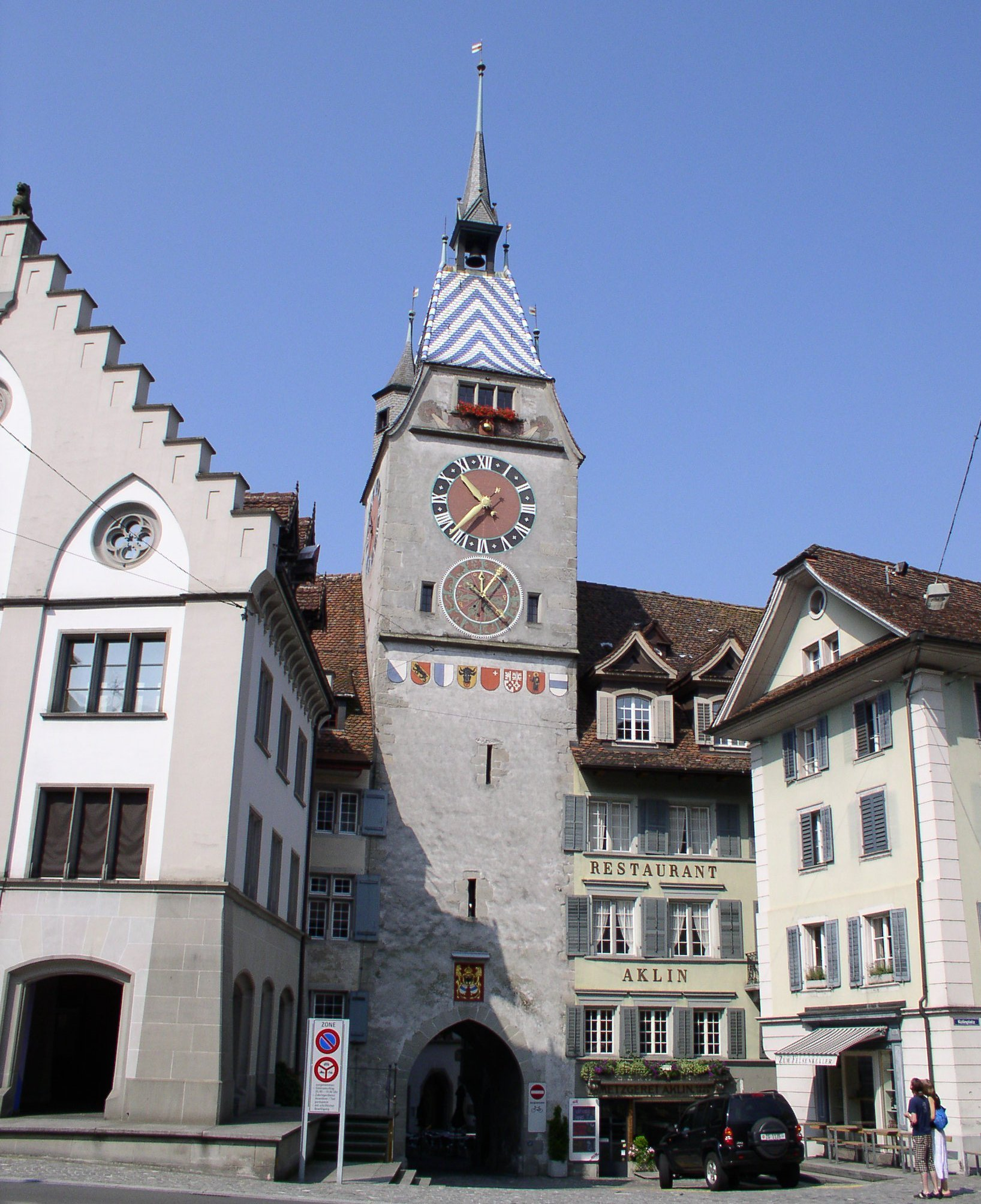 Description: Die dem Kolinplatz zugewandte Seite des Zytturms in Zug Source: photo taken by me, July 2005 Photographer: Baikonur